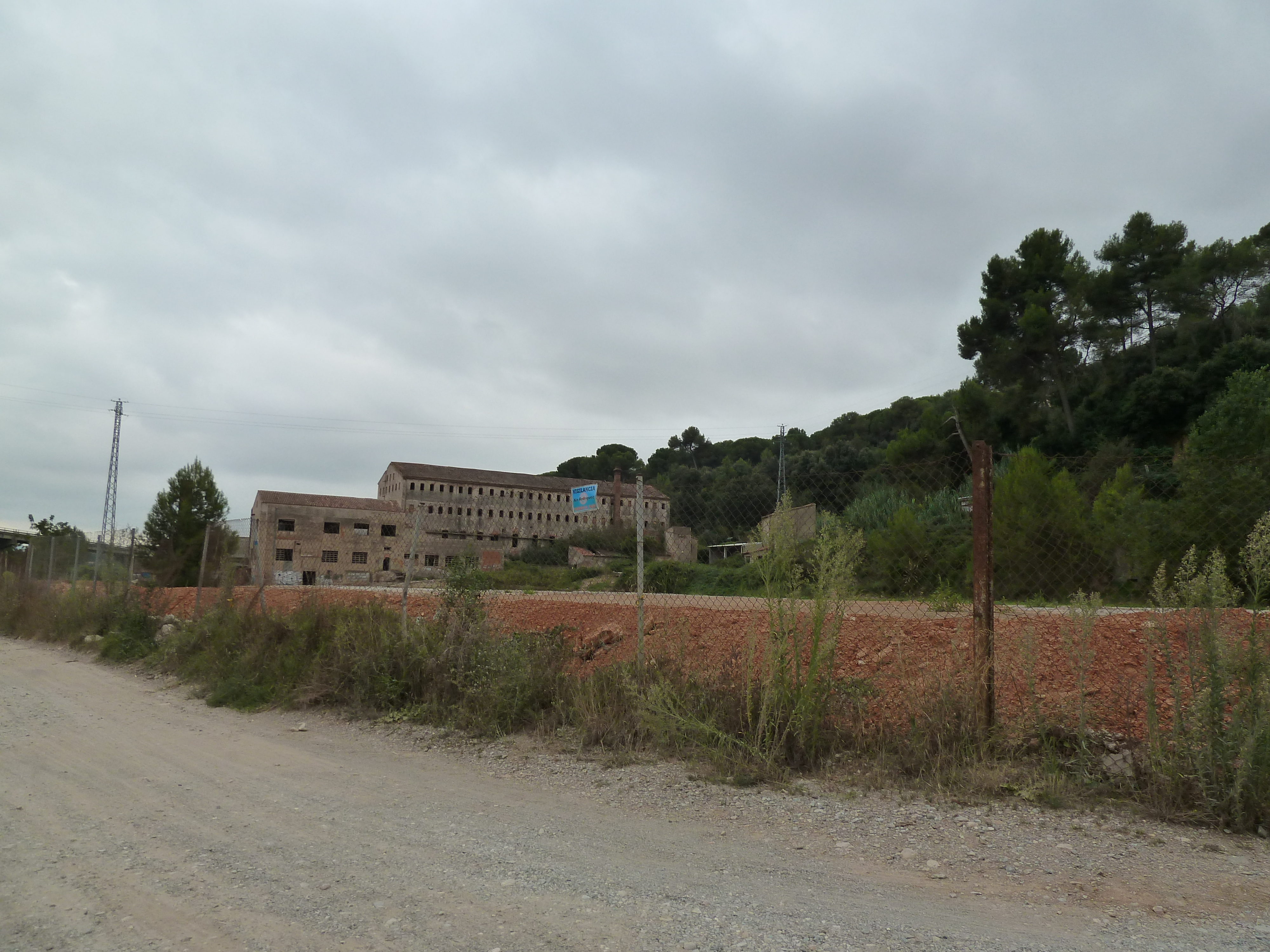 Obra Popular segle XVI